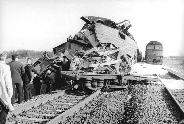 ADN-ZB Bartocha-26.4.1988-kb-Bez. Neubrandenburg: Zugunglück-Ein Zugunglück ereignete sich auf der Strecke Pasewalk-Anklam. Zwischen den Ortschaften Ferdinandshof und Borkenfriede im Kreis Ückermünde stieß der D-Zug 502 Saalfeld-Stralsund mit dem D-Zug 715 Binz-Leipzig zusammen. Dabei entgleisten die Lokomotiven beider Züge und drei Wagen. Bei dem Unglück kam eine Reisende ums Leben. 28 Personen wurden verletzt, sechs von ihnen schwer. -siehe dazu ADN-Meldung